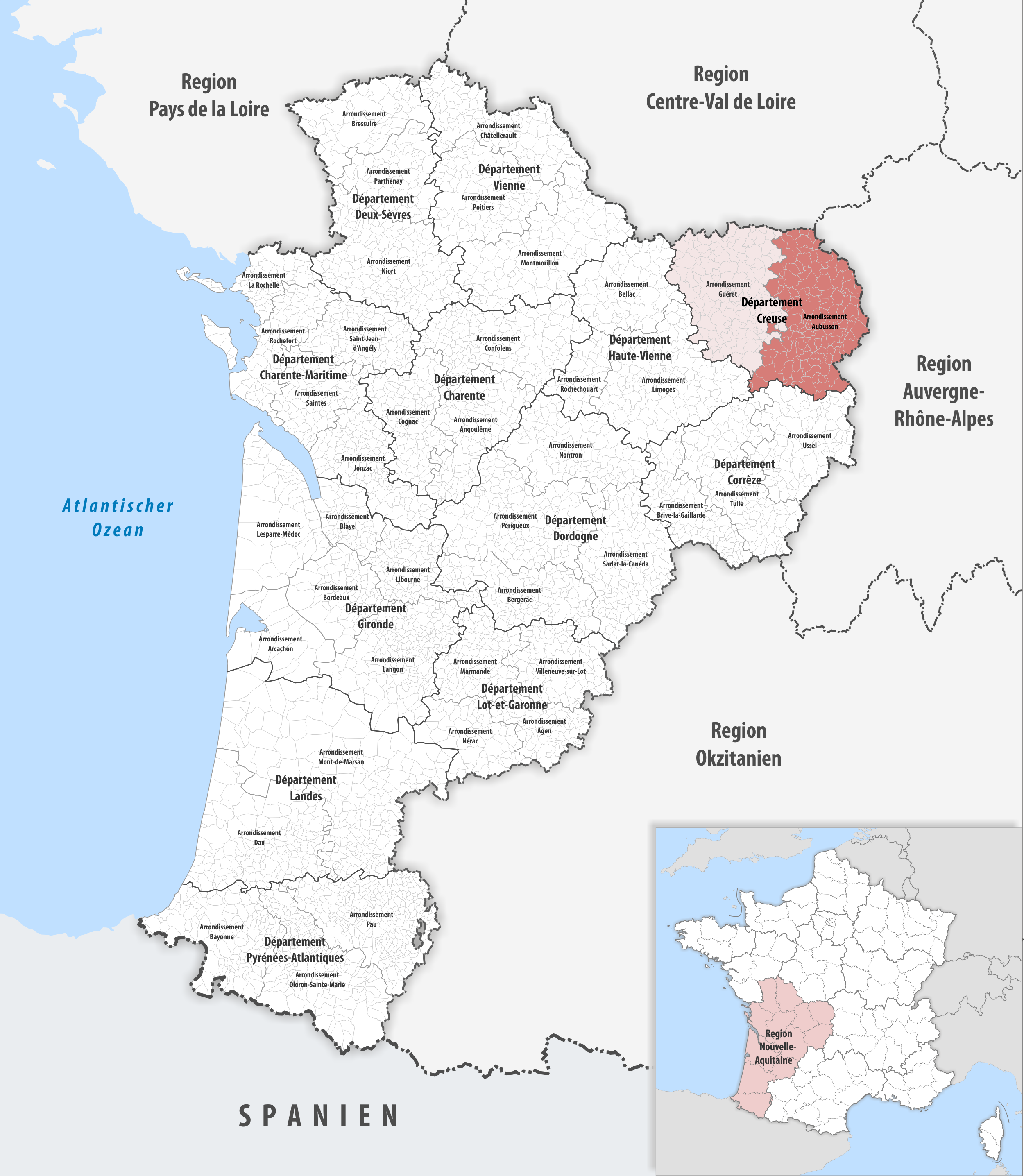 Lage des Arrondissements Aubusson